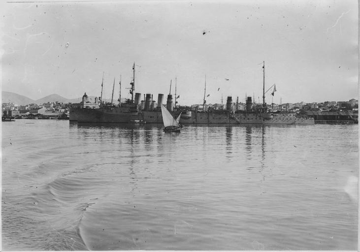 vue prise par un photographe de l'armée française.